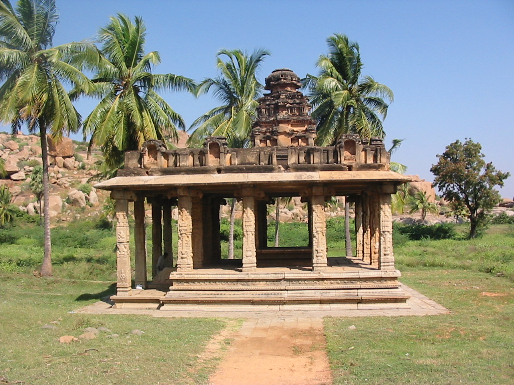 Hampi - Gejjalla Mandapa